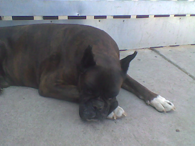 12 éves boxerkutya